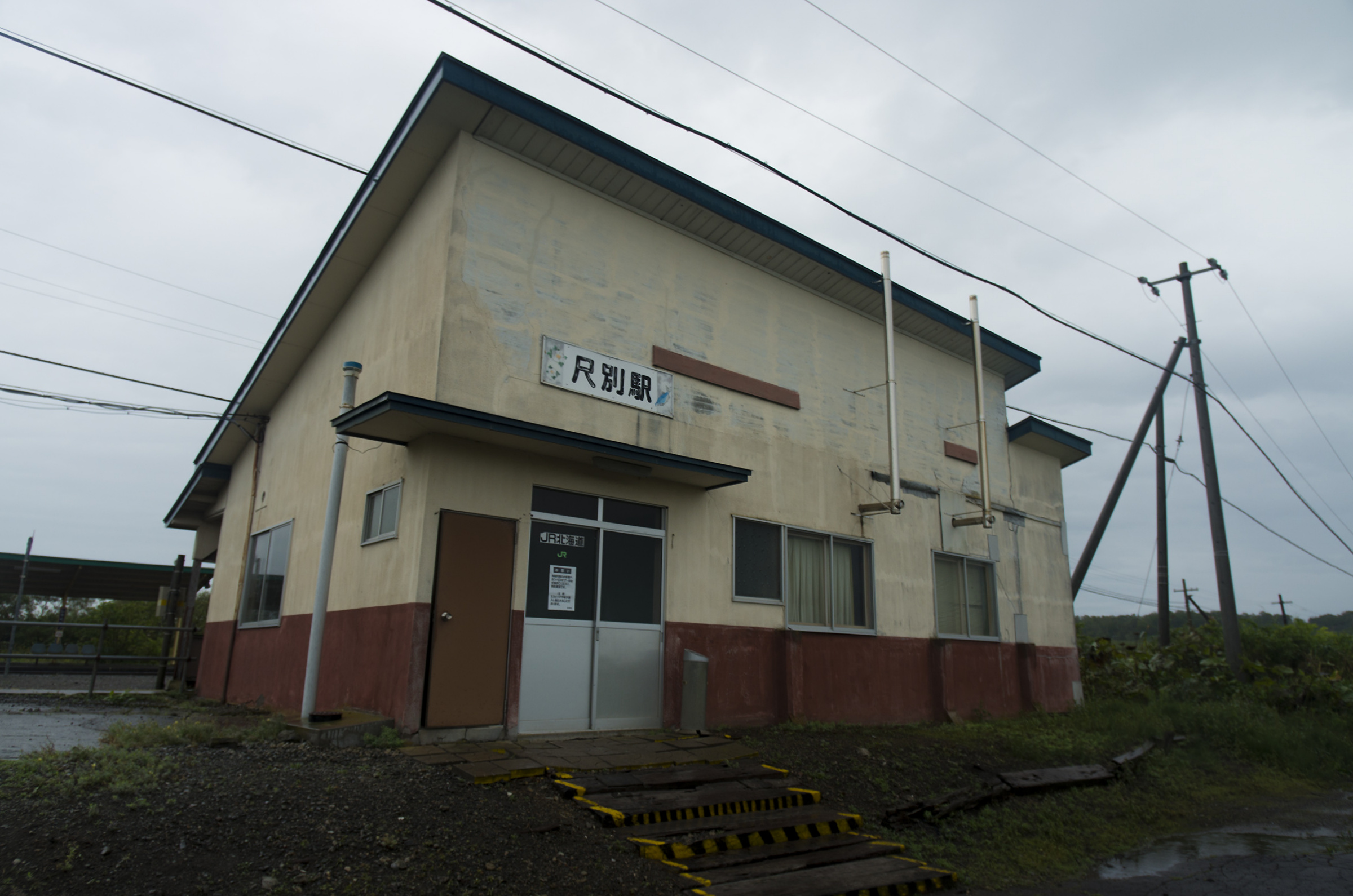 北海道旅客鉄道株式会社根室本線尺別駅駅舎